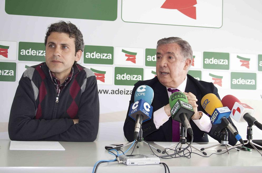 El Secretario General Luis Almena y el Vicepresidente Ejecutivo Miguel Ángel Mateos en una rueda de prensa